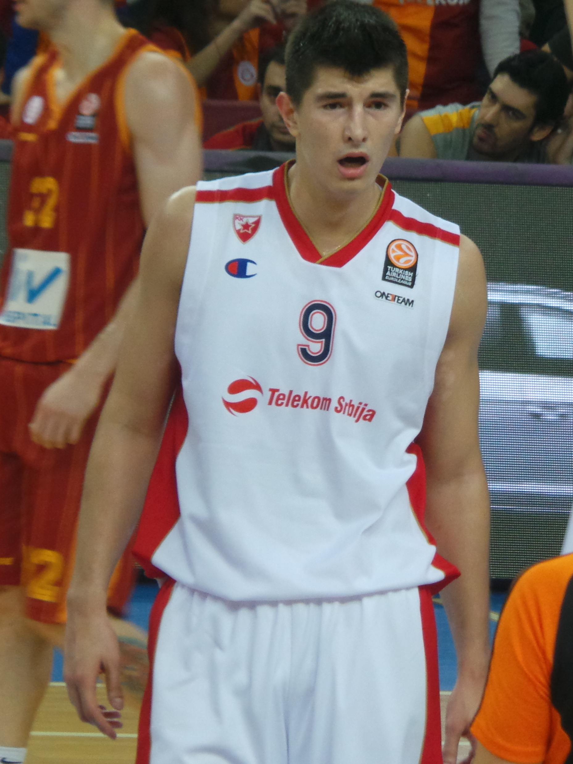 Luka Mitrović